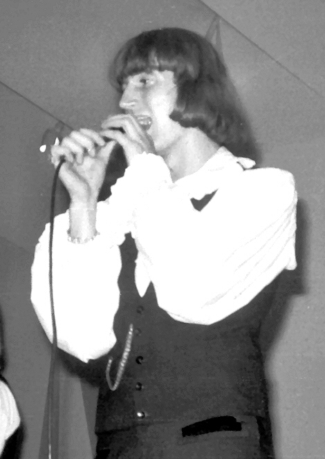 Lord Ulli mit den Lords bei einem Komzert in Mainz 1967; man bachte die Uhrenkette!